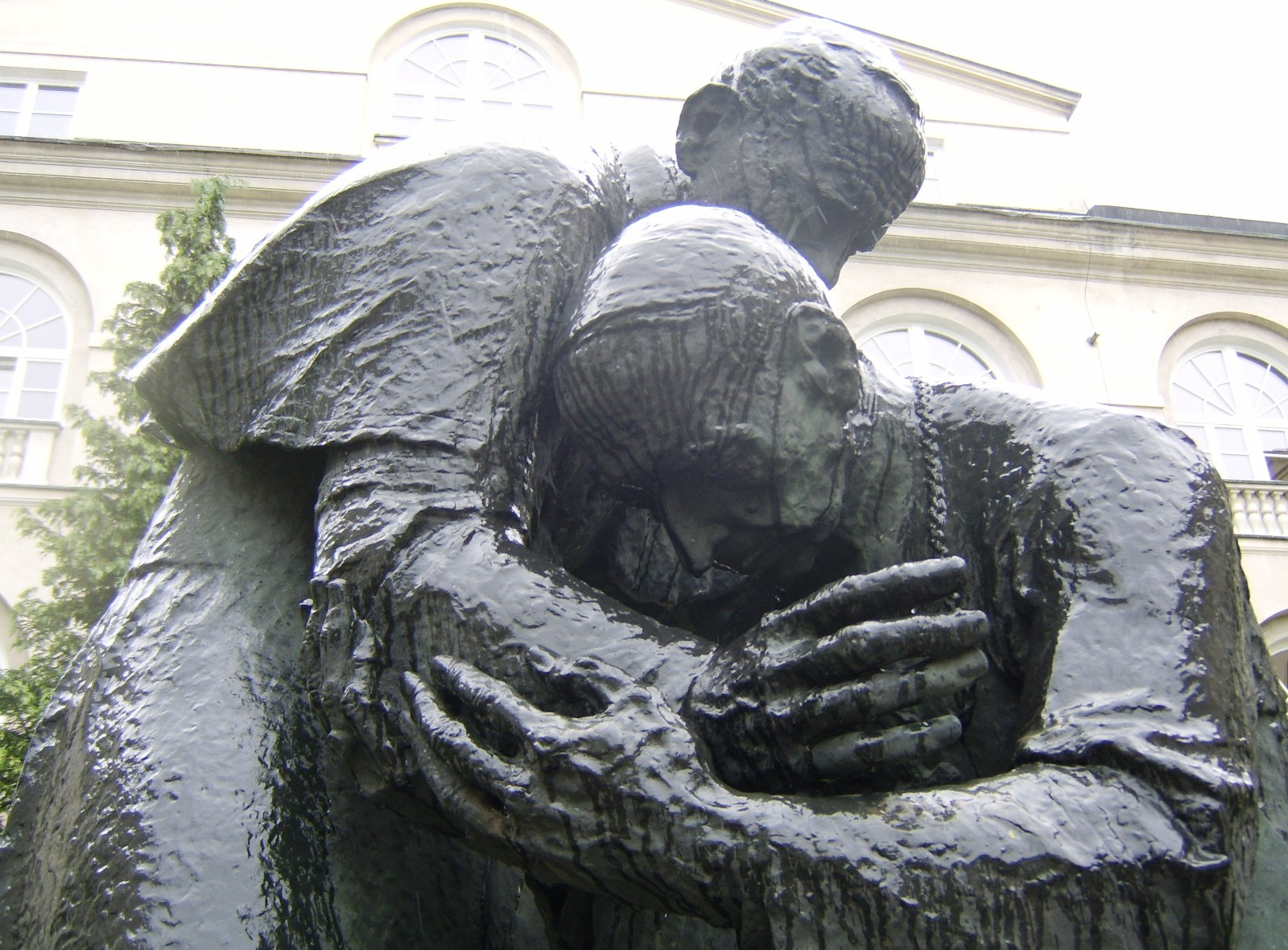 Dziedziniec Katolickiego Uniwersytetu Lubelskiego im. Jana Pawła II - pomnik Jana Pawła II i kardynała Stefana Wyszyńskiego